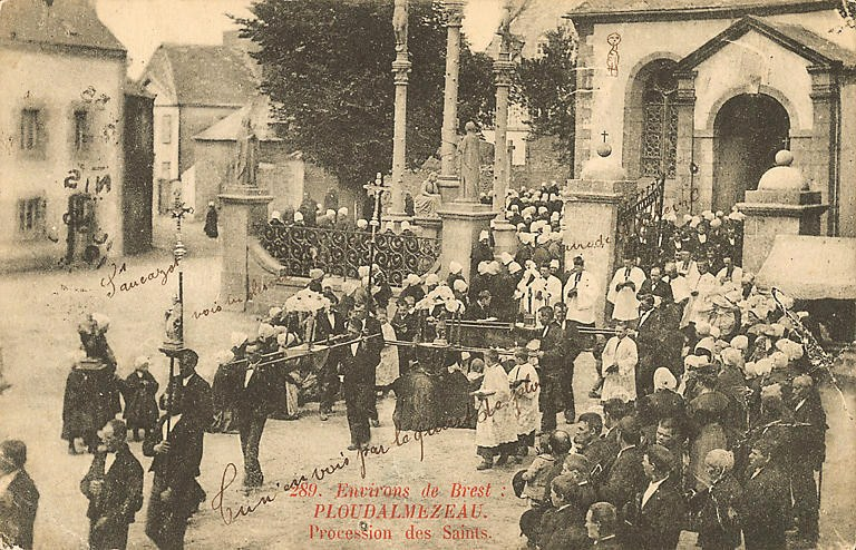 Ploudalmézeau La procession des saints en 1908 (photo anonyme, musée des arts et traditions populaires)